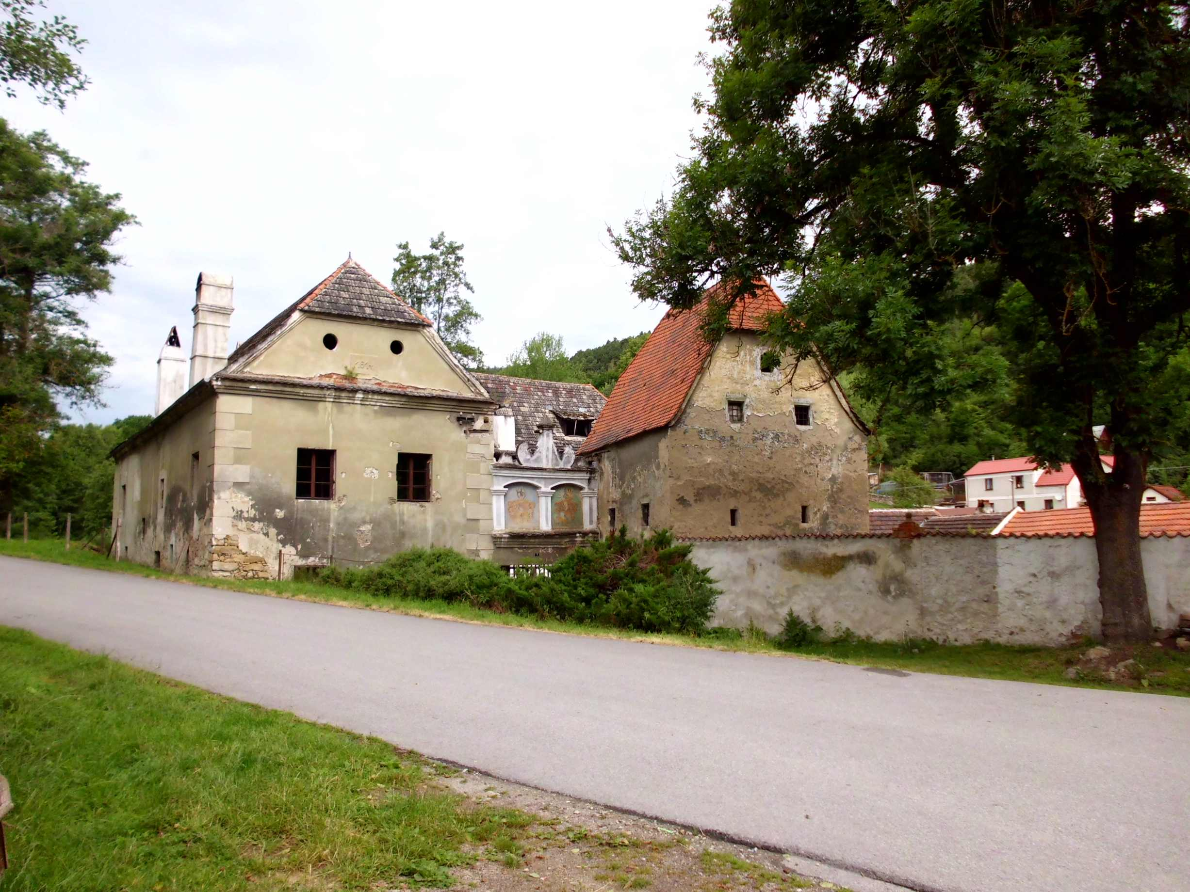 Hammermuhle in Stare Dobrkovice